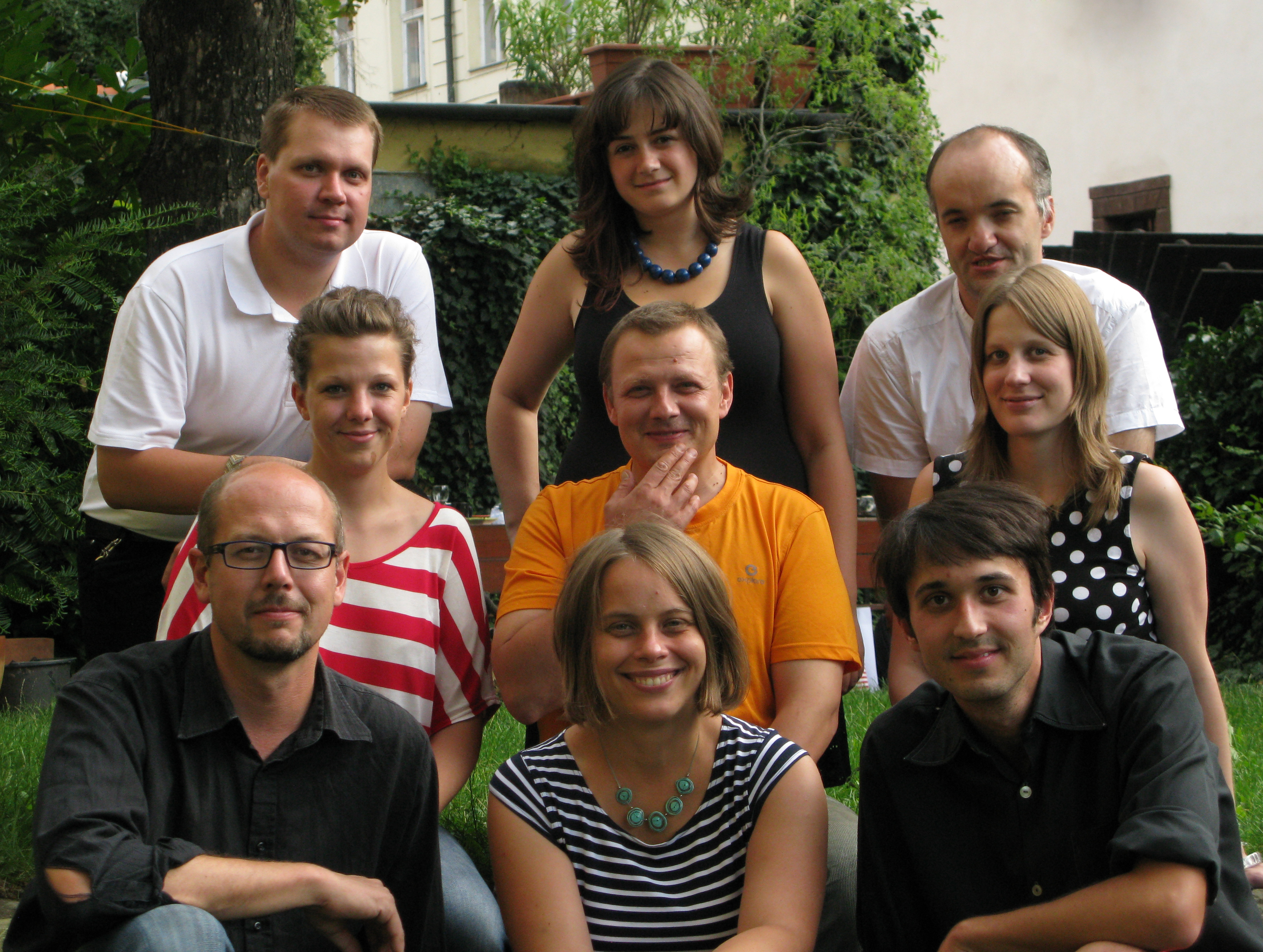 Tým Post Bellum v srpnu 2013